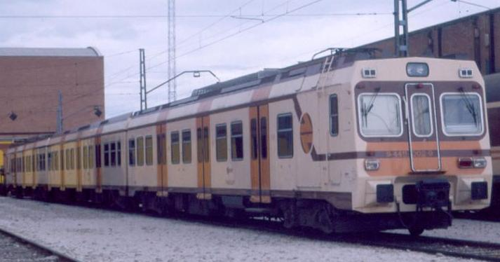 Serie 445 de Renfe.